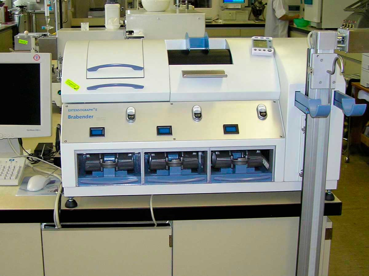 Extensograph in einem Mühlen-Labor zur Bestimmung der Dehneigenschaften eines Teiges